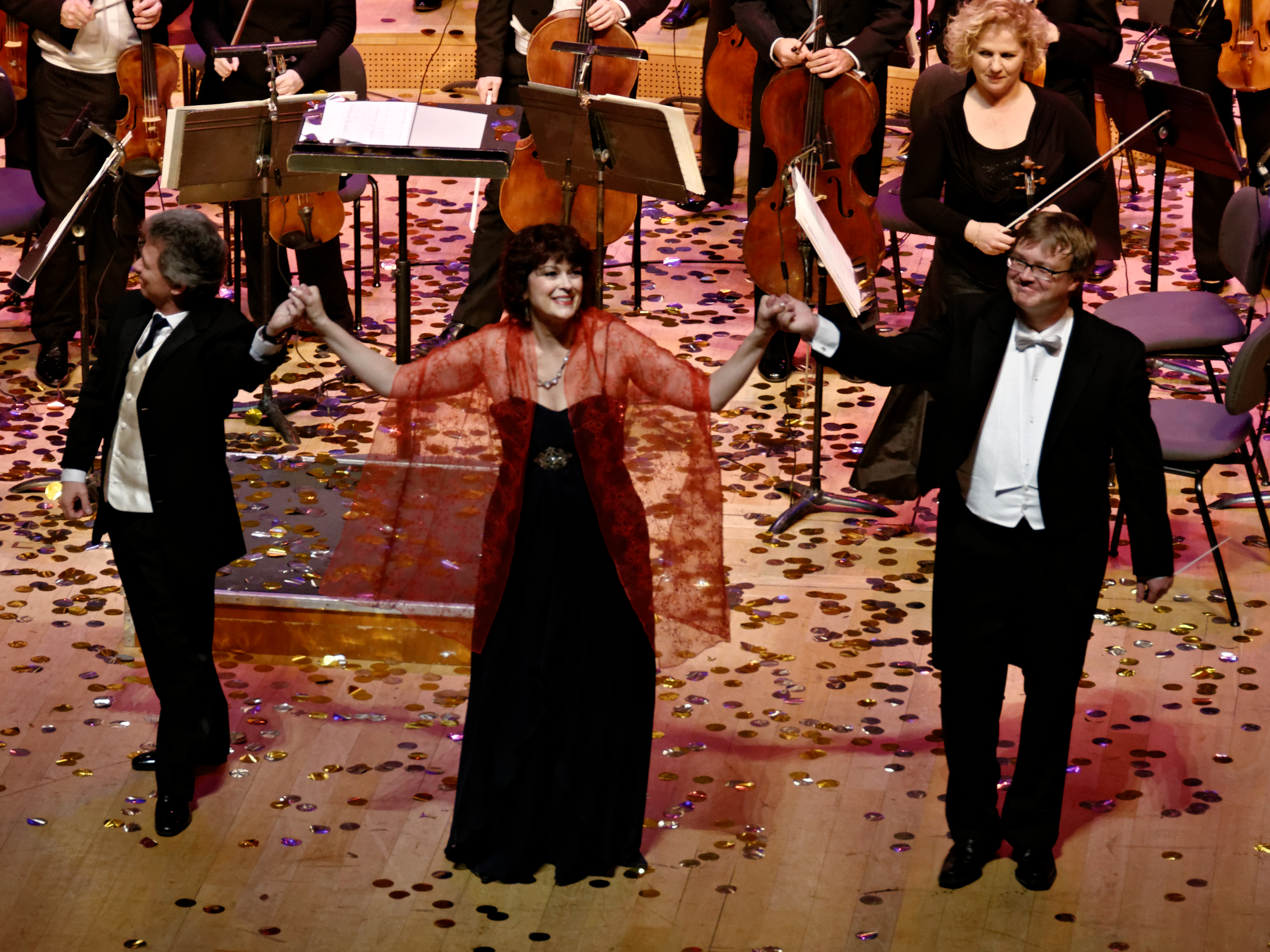 De gauche à droite : Jean-Paul Fouchécourt (ténor), Jennifer Larmore (mezzo-soprano), Philippe Bach (chef d'orchestre). Auditorium Maurice Ravel, Lyon 2013